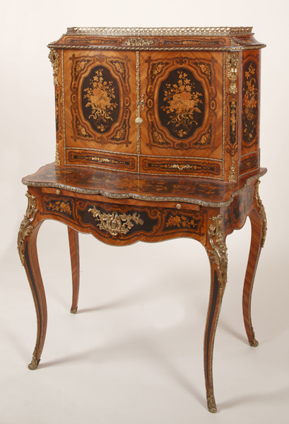 Mesa escritorio. Escritorio de Carolina Coronado.